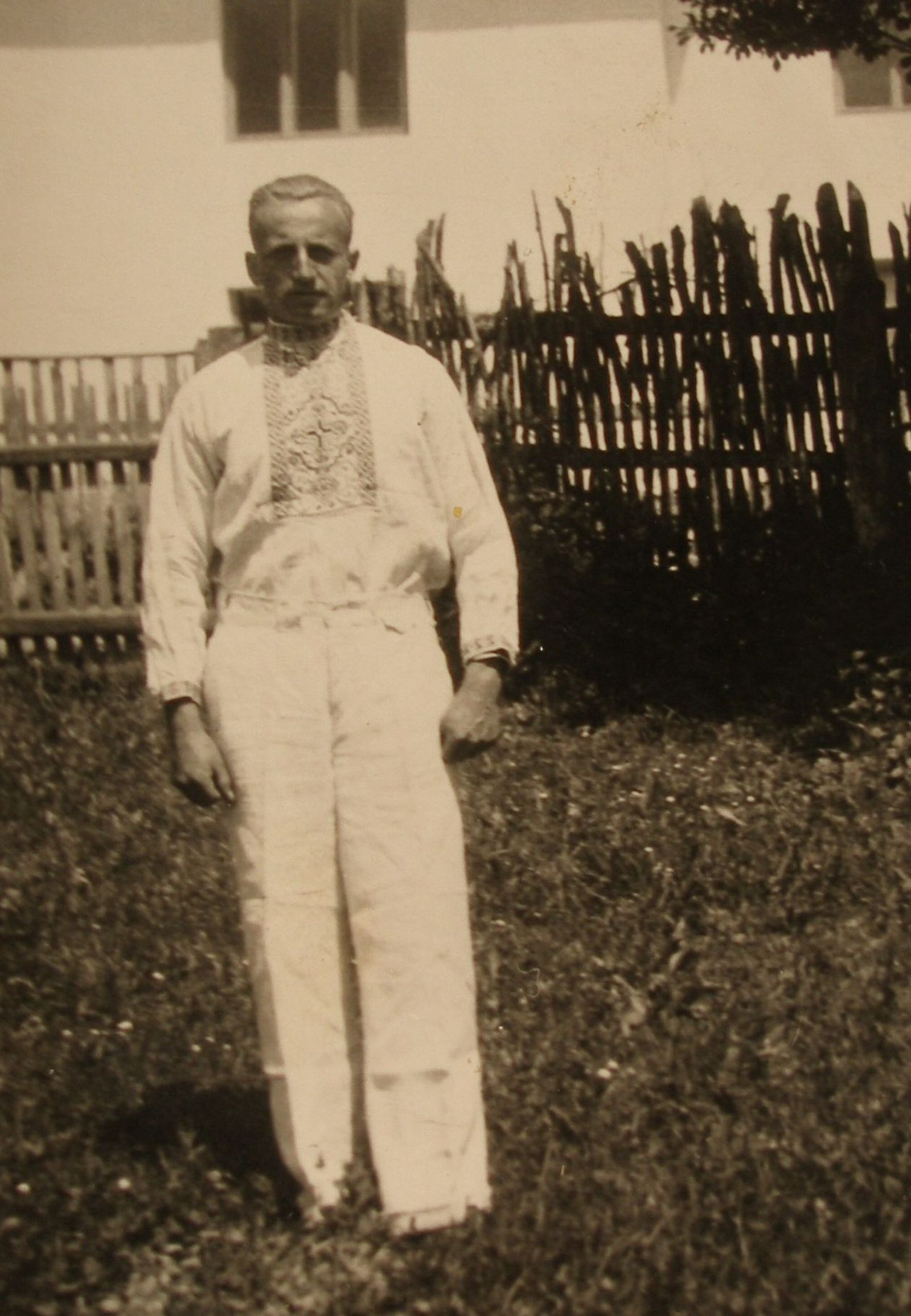 Sedlická výšivka na mužskom šarišskom kroji. Sedlice okres Prešov, Výšivka a pôvodná fotografia je z leta roku 1942. Autorka výšivky Veronika Fedorová. Na fotografii je Jakub Kotulič.